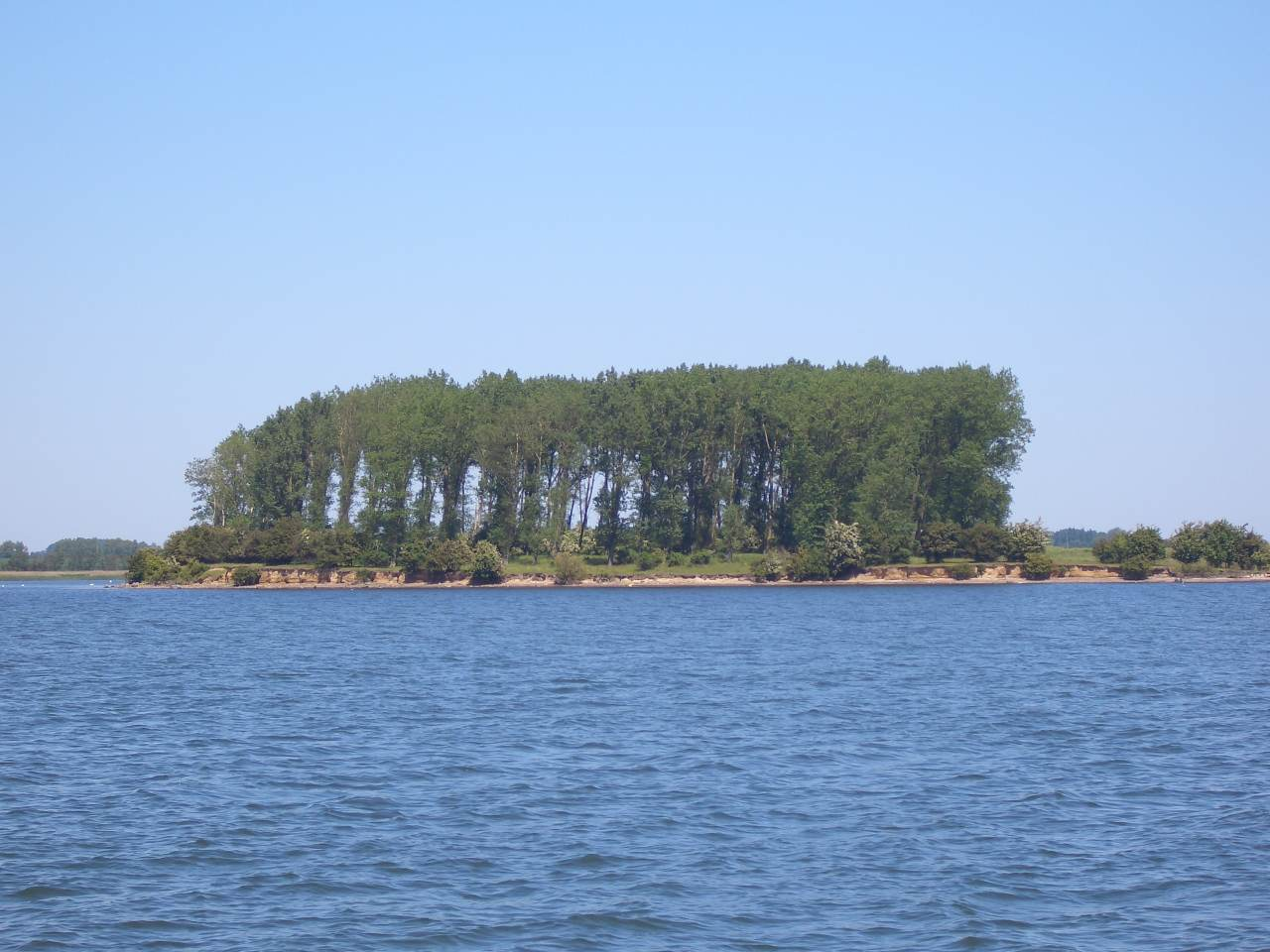 Blick auf den Westteil des Naturschutzgebietes Vogelhaken Glewitz.